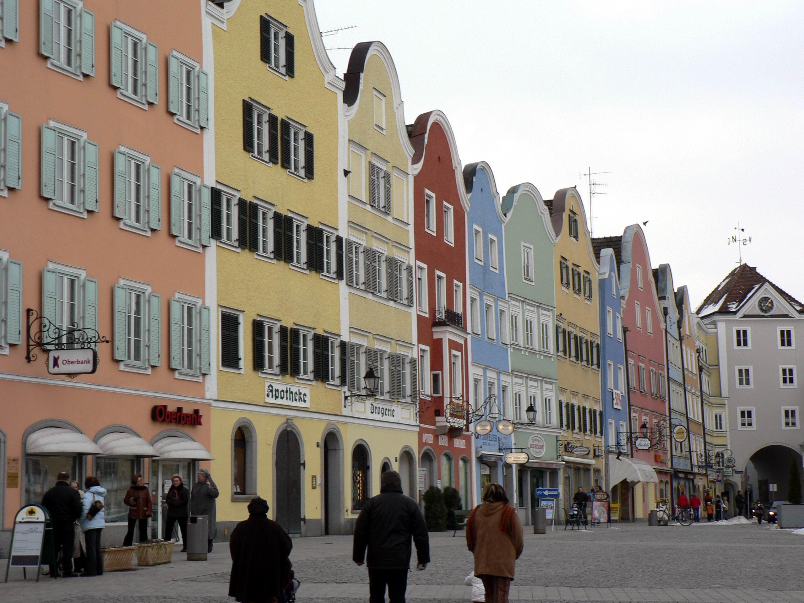 Schaerding_Marktplatz